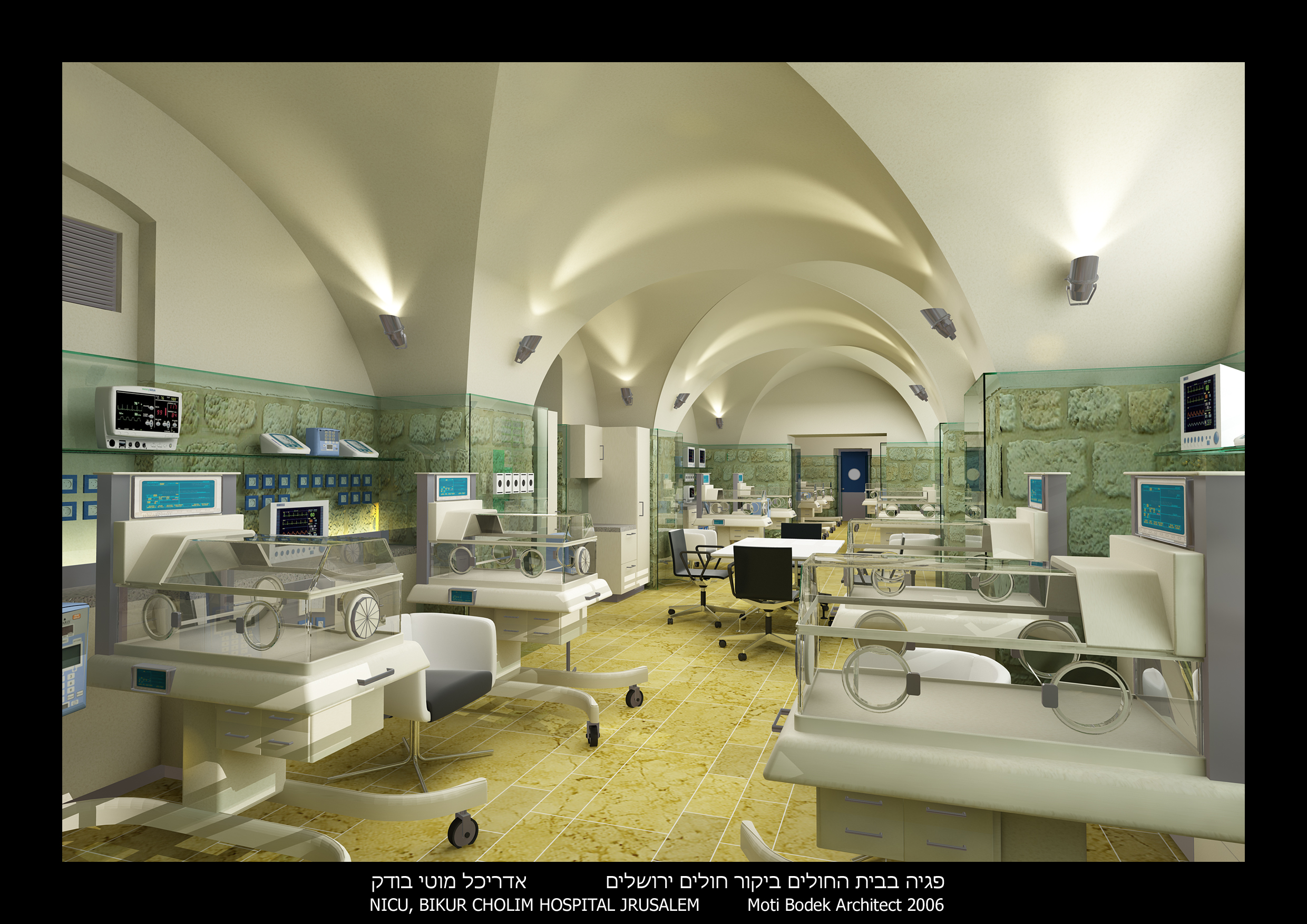 הדמית מחשב של הפגיה הנמצאת בבניה בביקור חולים